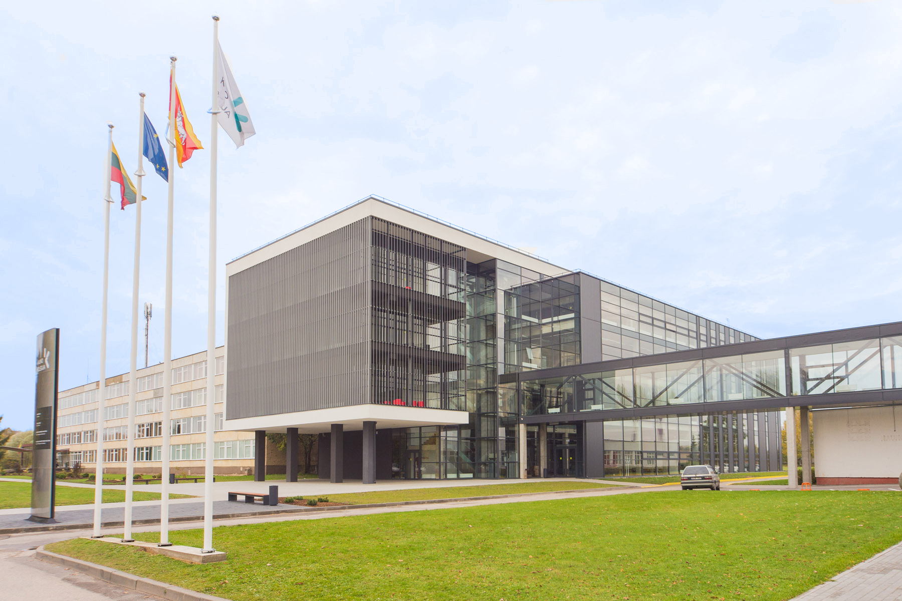 Daugiau kaip 4000 kv. metrų statinyje veikia nauja skaitykla, lingvistikos kabinetas, suprojektuotos laisvalaikio erdvės, suformuotos darbo vietos, skirtos individualiam ir komandiniam mokymuisi. Naujasis akademinis statinys suprojektuotas, pastatytas, įrengtas ir aprūpintas realizuojant projektą „Kauno kolegijos infrastruktūros plėtra ir valdymo optimizavimas“ (Nr. VP3-2.2-ŠMM-14-V-01-003), kuris finansuotas Europos regioninės plėtros fondo ir Lietuvos Respublikos biudžeto lėšomis pagal 2007-2013 m. Sanglaudos skatinimo veiksmų programos 2 prioriteto priemonę „Kolegijų infrastruktūros atnaujinimas ir plėtra“. Projektu, kurio vertė – 11 mln. litų, siekta pagerinti Kauno kolegijos studijų kokybę, tarptautinį konkurencingumą ir prieinamumą, išplečiant ir modernizuojant kolegijos infrastruktūrą bei optimizuojant valdymą.